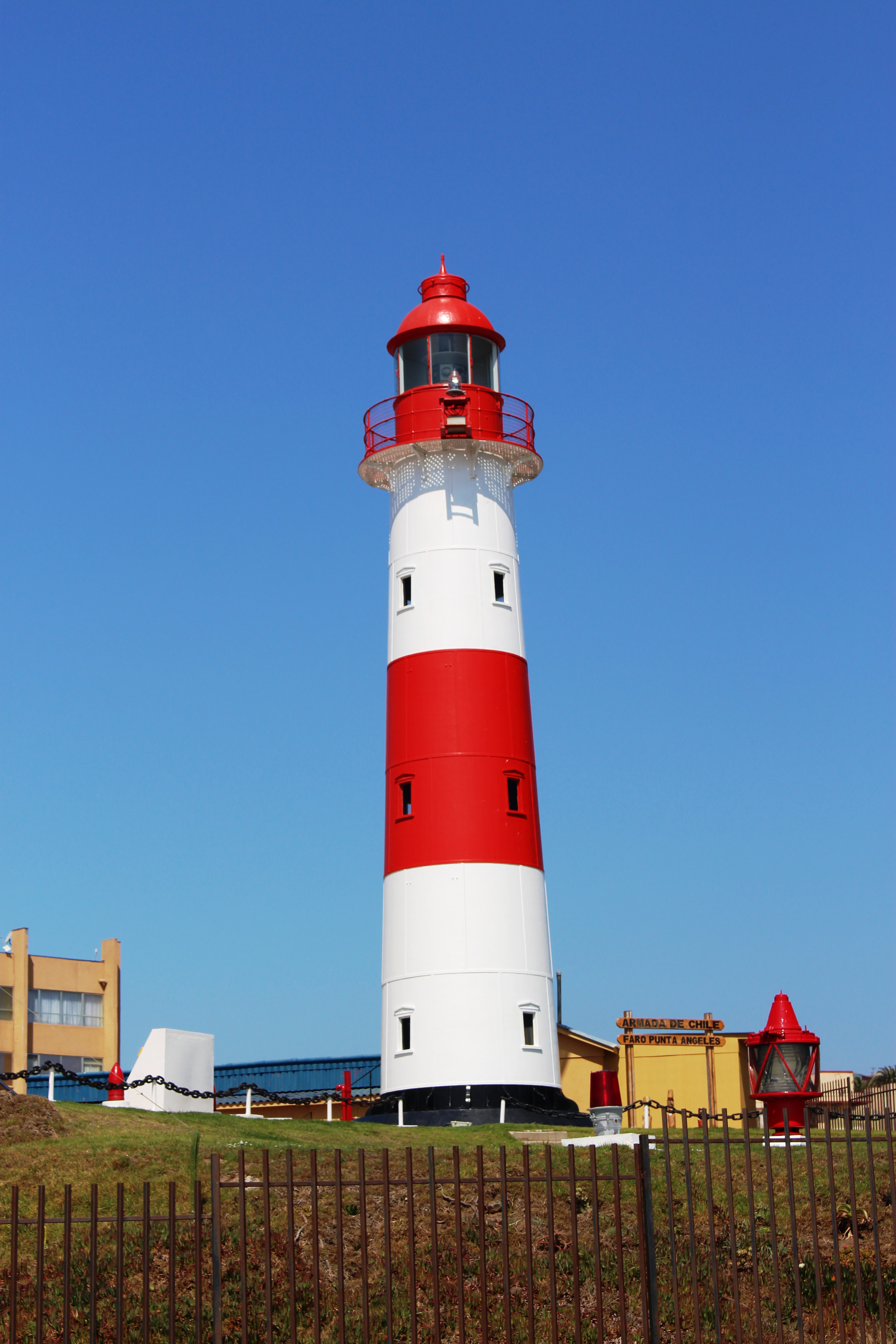 Faro Punta Ángeles ubicado en Playa Ancha comuna de Valparaíso, Chile